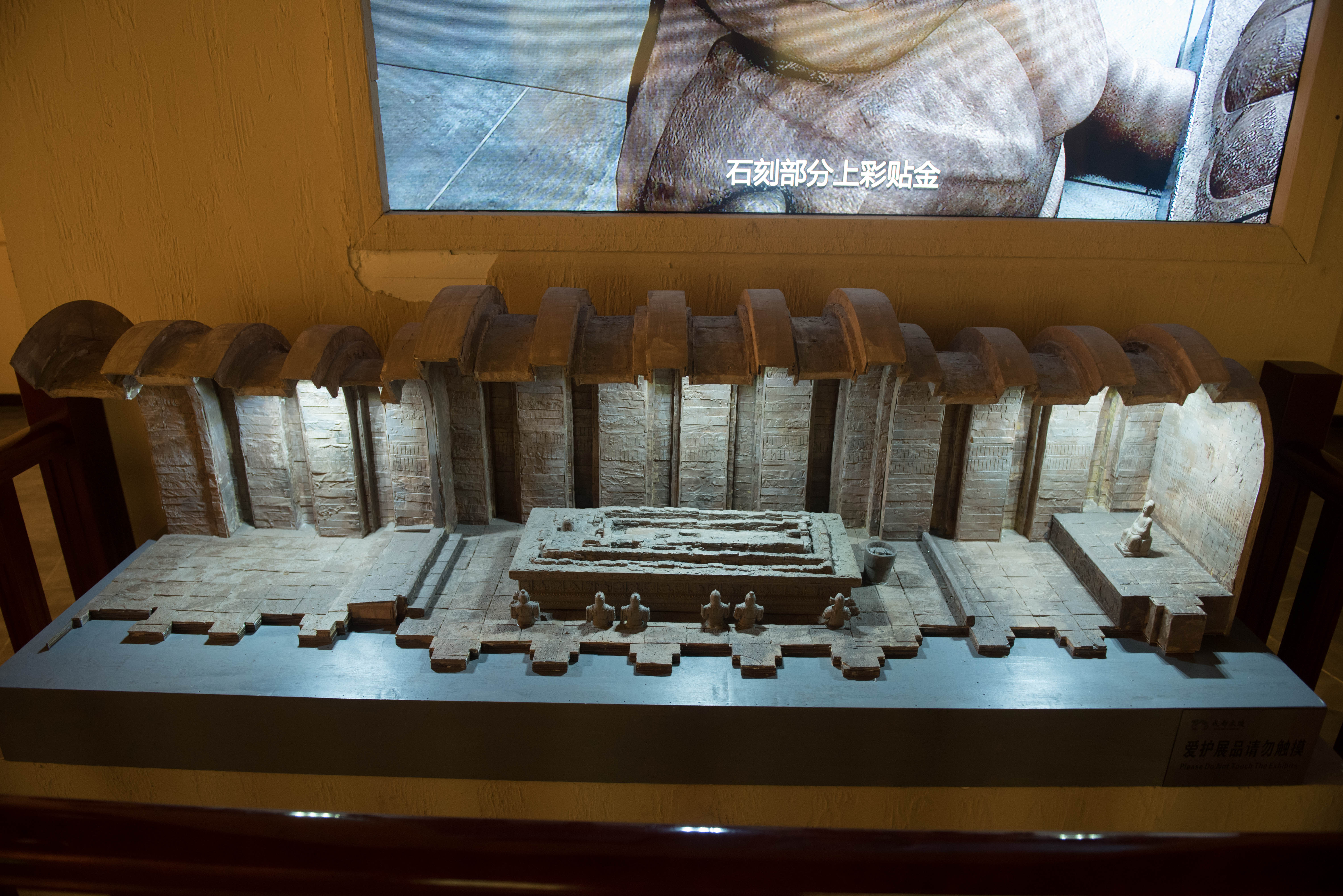 王建墓，2017-09-18